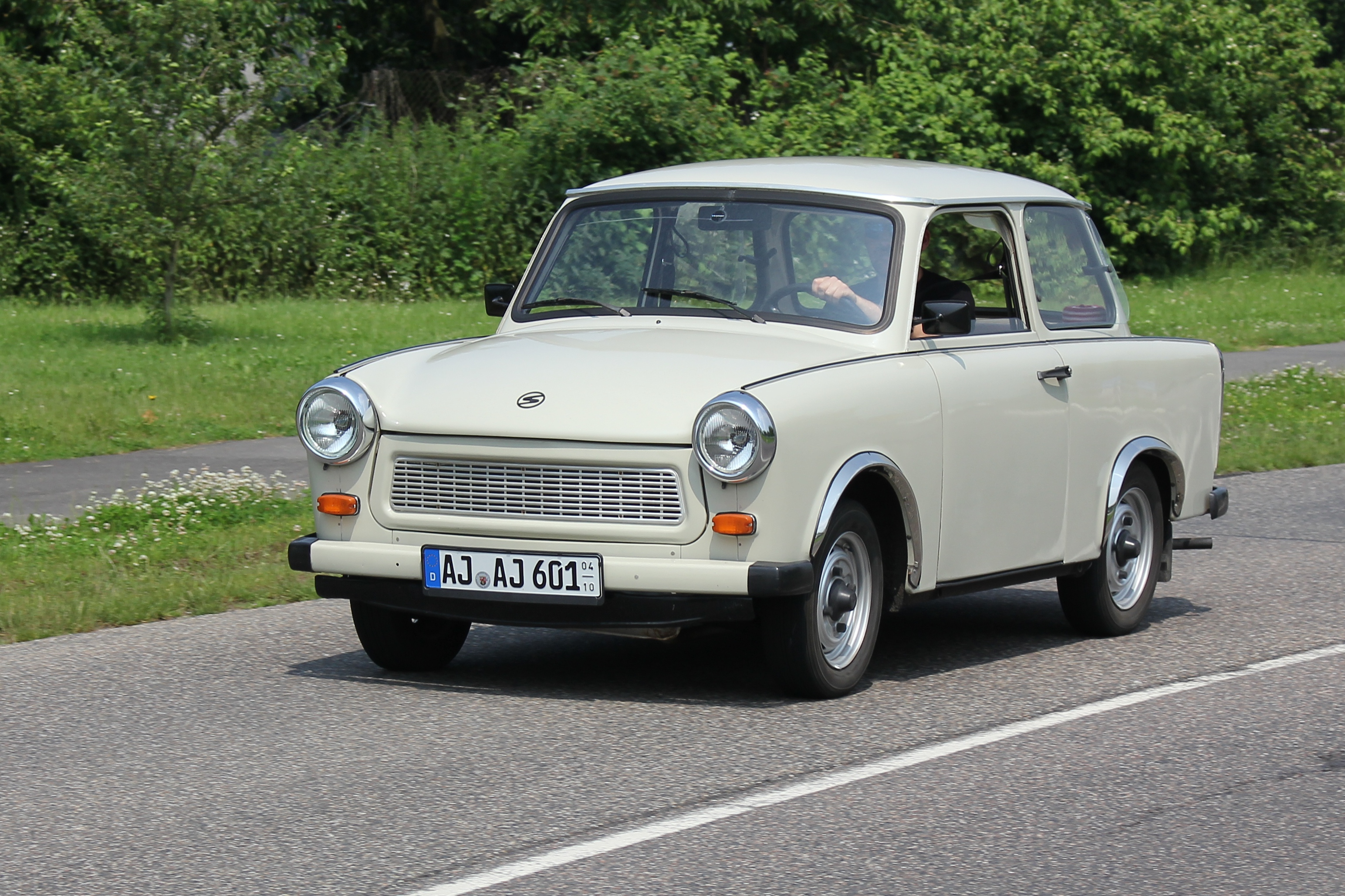 Trabant P 601 Limousine S, Baujahr 1986 (Fiktives Kennzeichen)